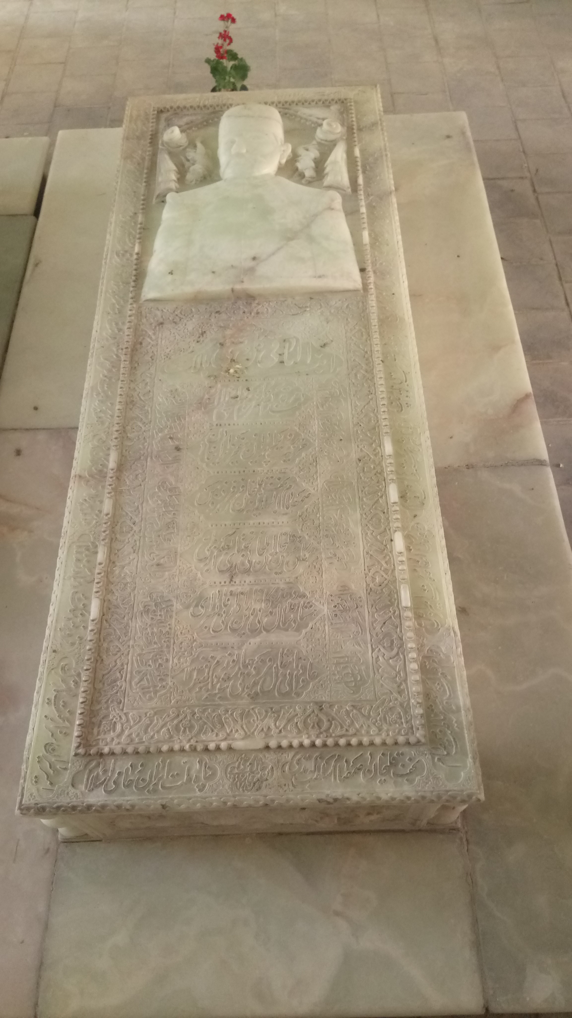 قبر نجفقلی خان صمصام السطنه